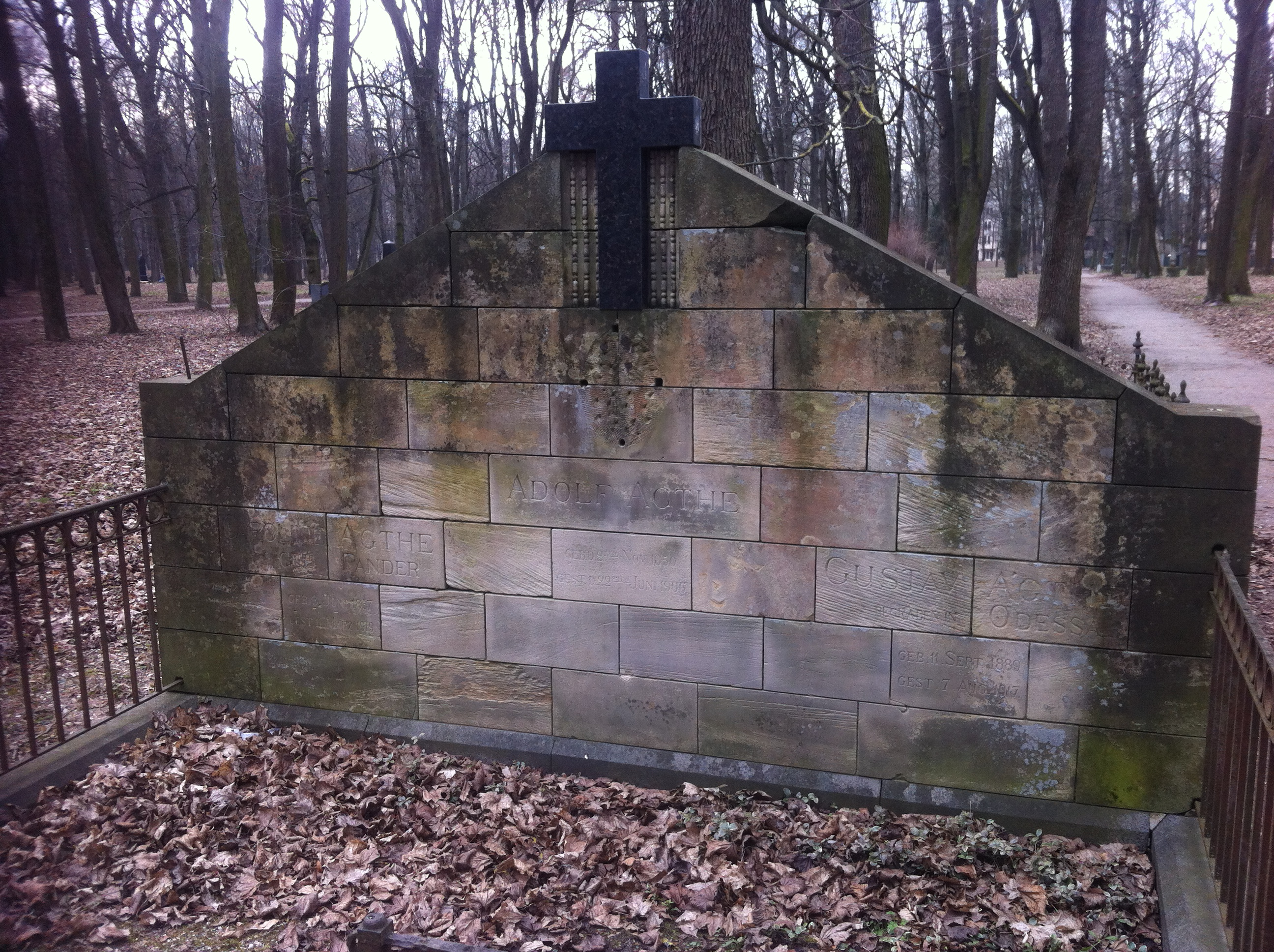 Agtes ģimenes kapu piemineklis Rīgas Lielajos kapos